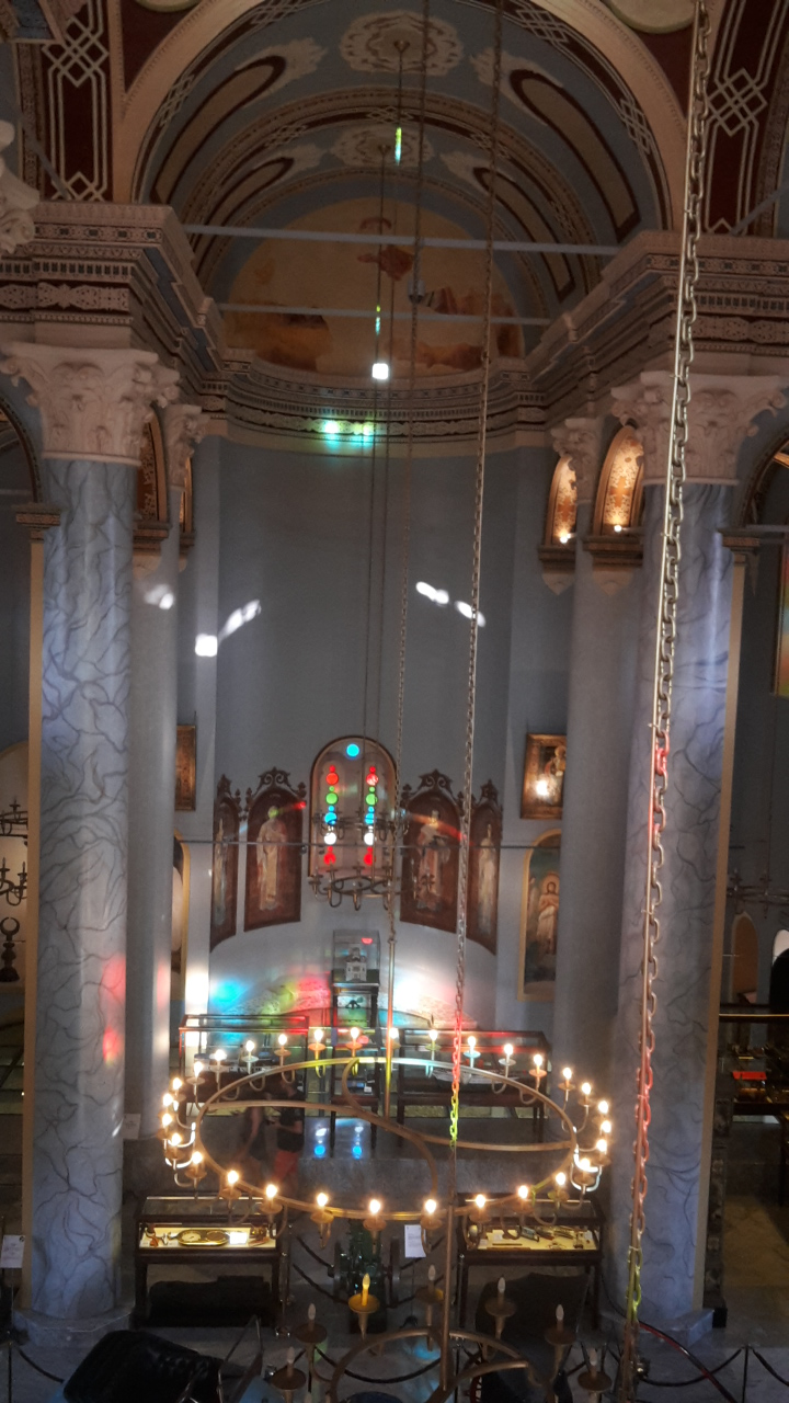 Innenraum der Taxiarchen-Kirche in Dschunda, Balikessir.